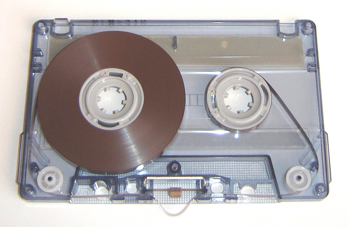 compact audio cassette, normal Fe I tape, Sony